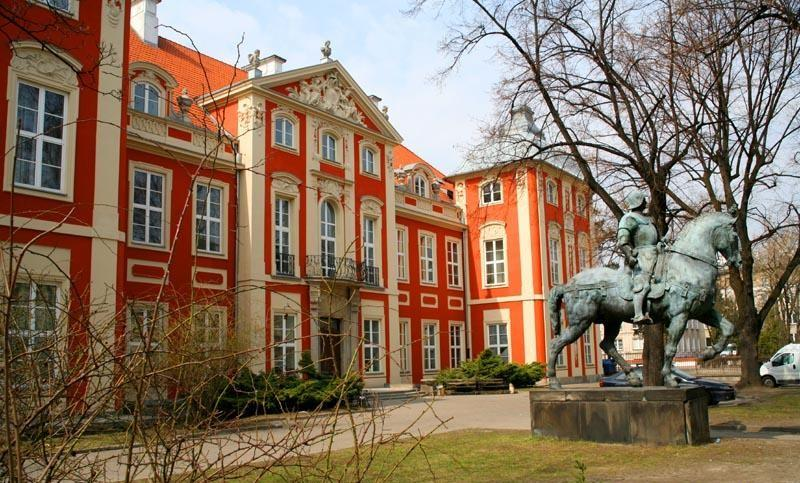 Warszawa (Polska)